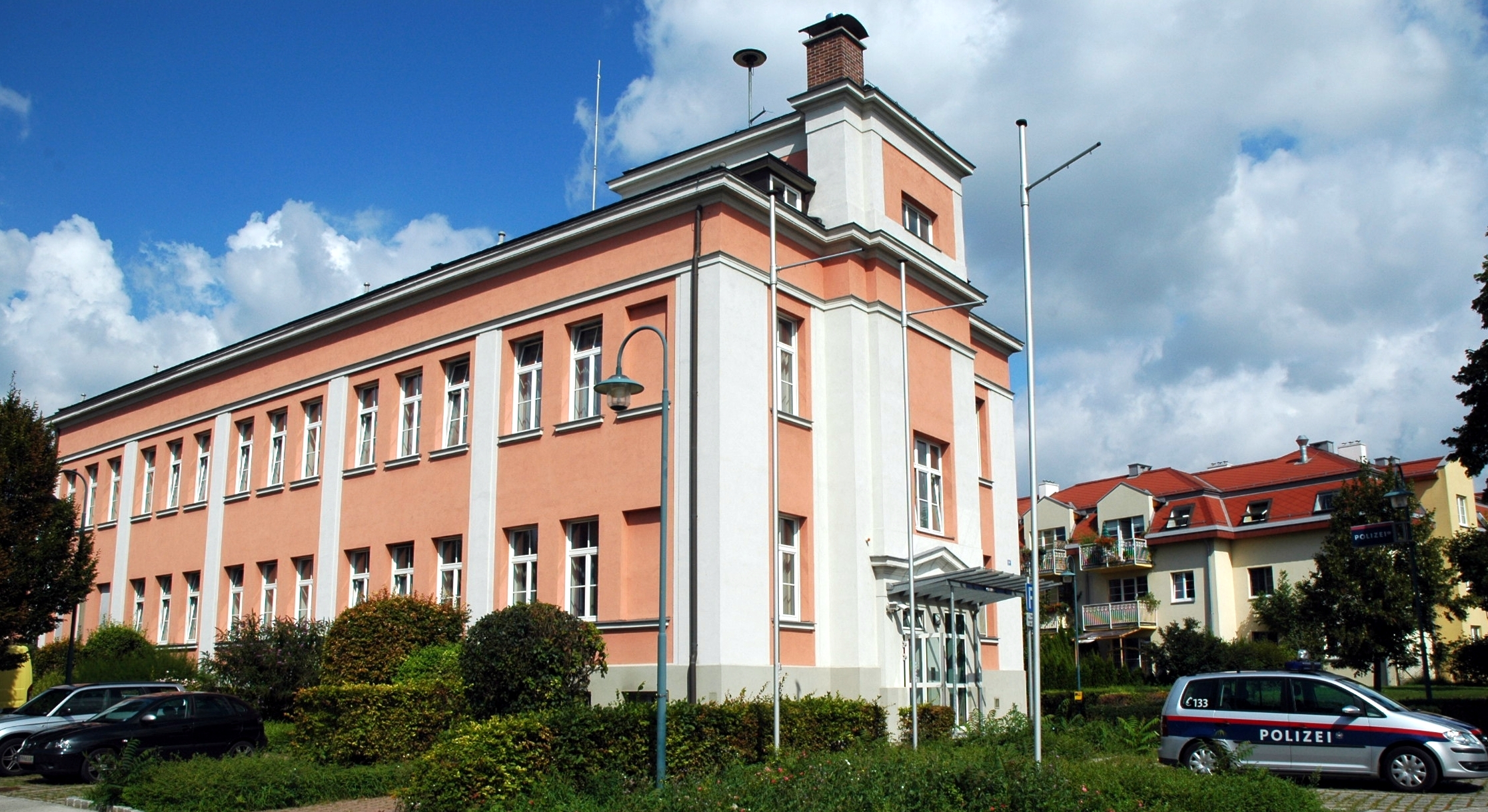 Aufnahme der k.k. Weiberstrafanstalt Wiener Neudorf, heute eine Polizeistation mit Wohnhaus in Österreich